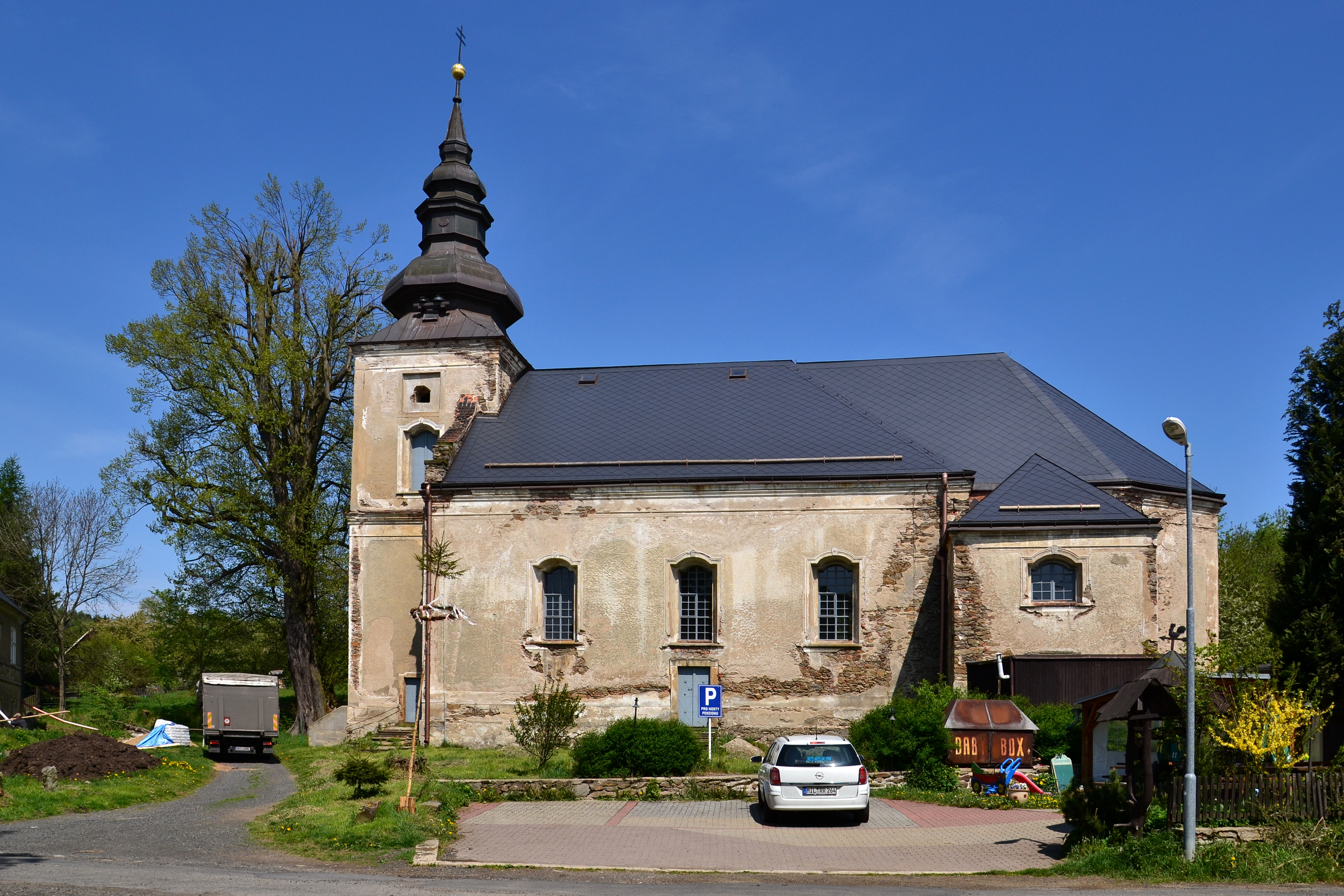 Kostel svatého Michaela archanděla - jižní strana